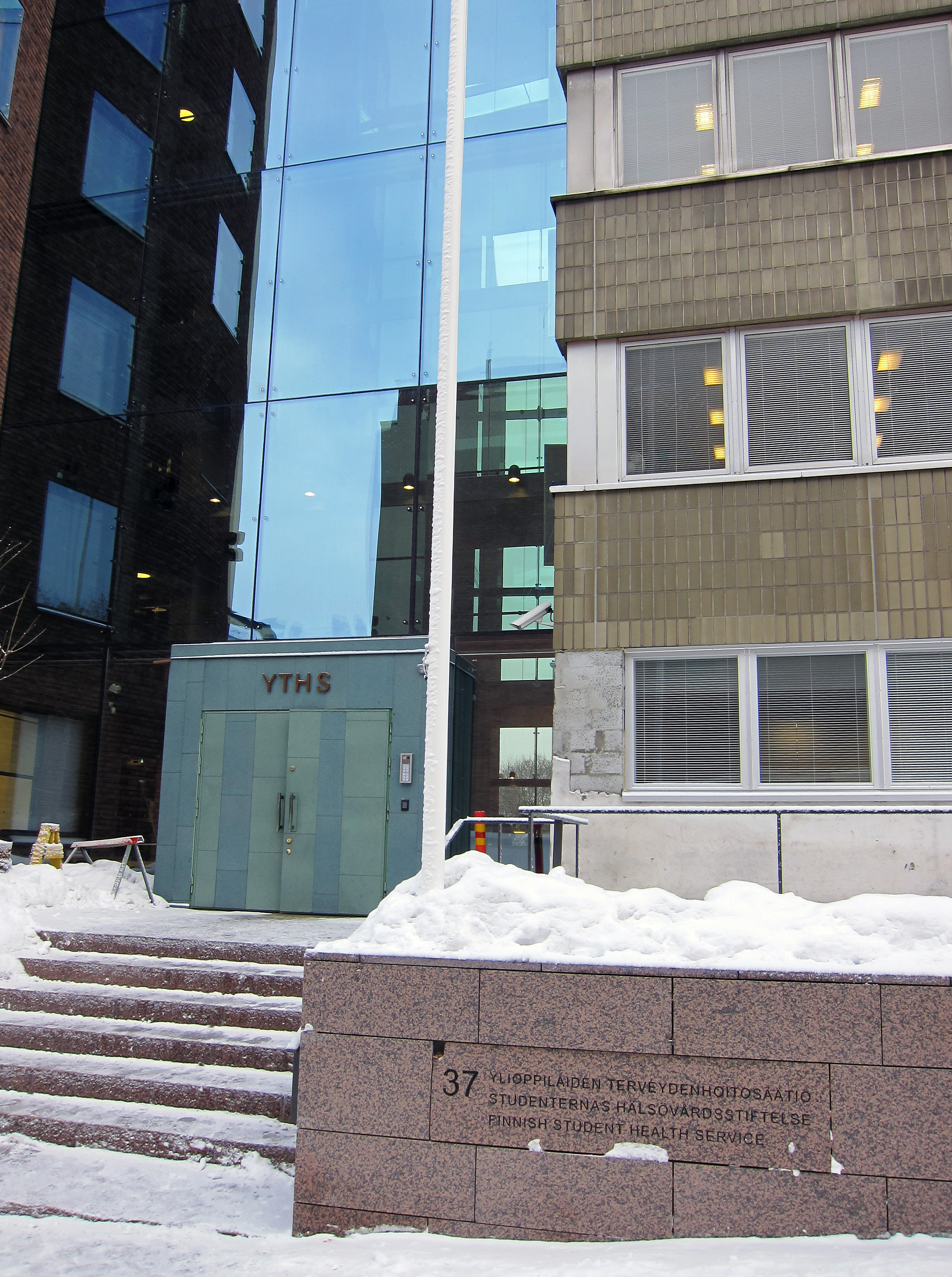 YTHS:n Töölön toimipiste Helsingissä.